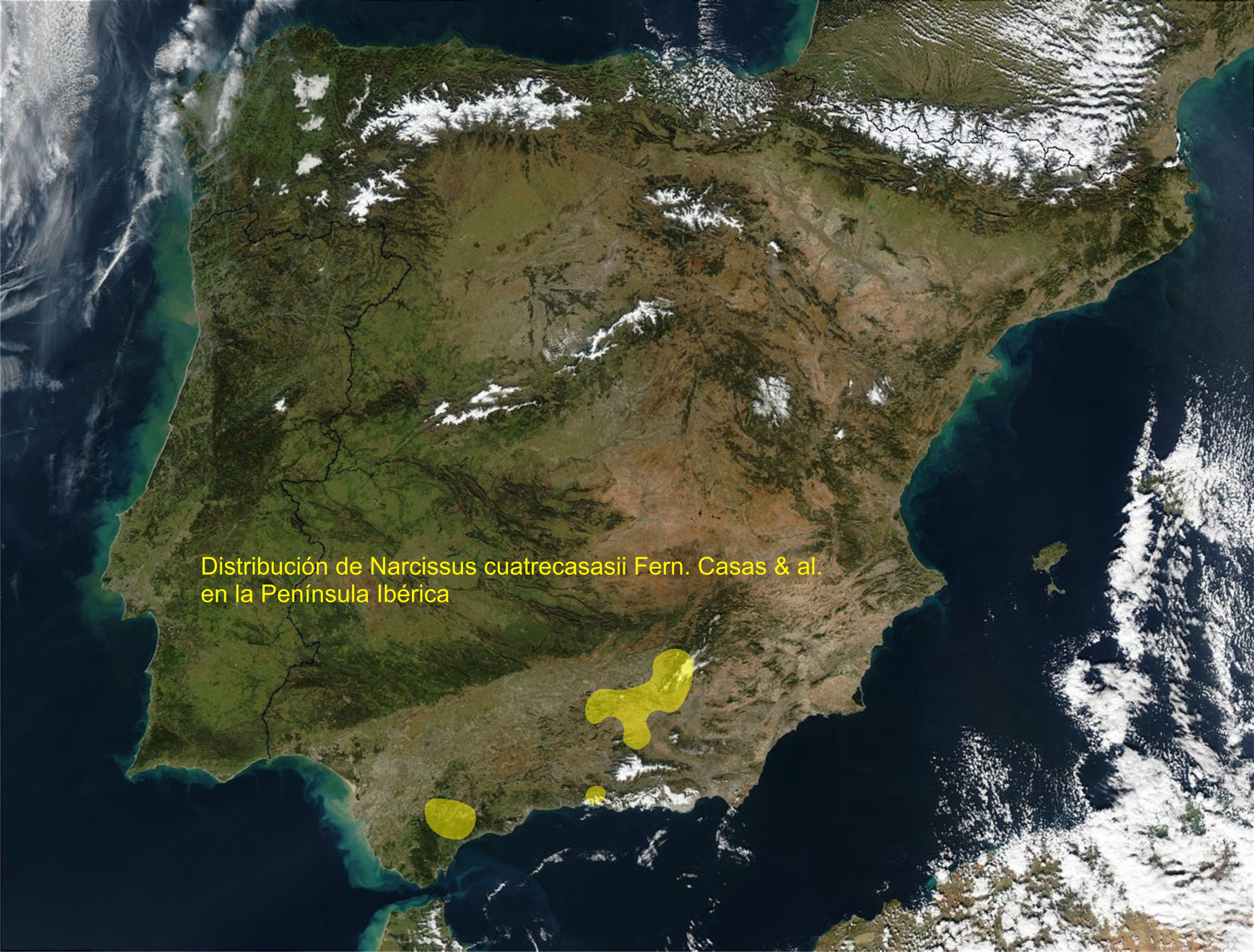 Área de distribución de Narcissus cuatrecasasii Fern. Casas & al. en la Península Ibérica.